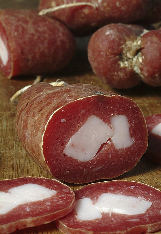 Soppressata di Gioi, Cilento – Italia.